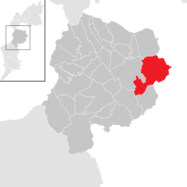 Bezirk Oberpullendorf